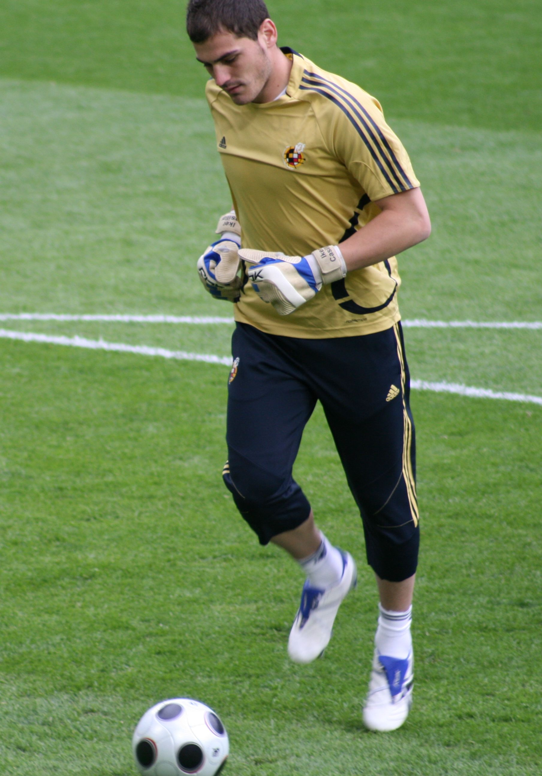 Foto recortada. El portero de la Selección Española de fútbol Iker Casillas. Foto tomada en el partido Suecia - España de la Eurocopa 2008, en el estadio Tivoli Neu (Innsbruck)